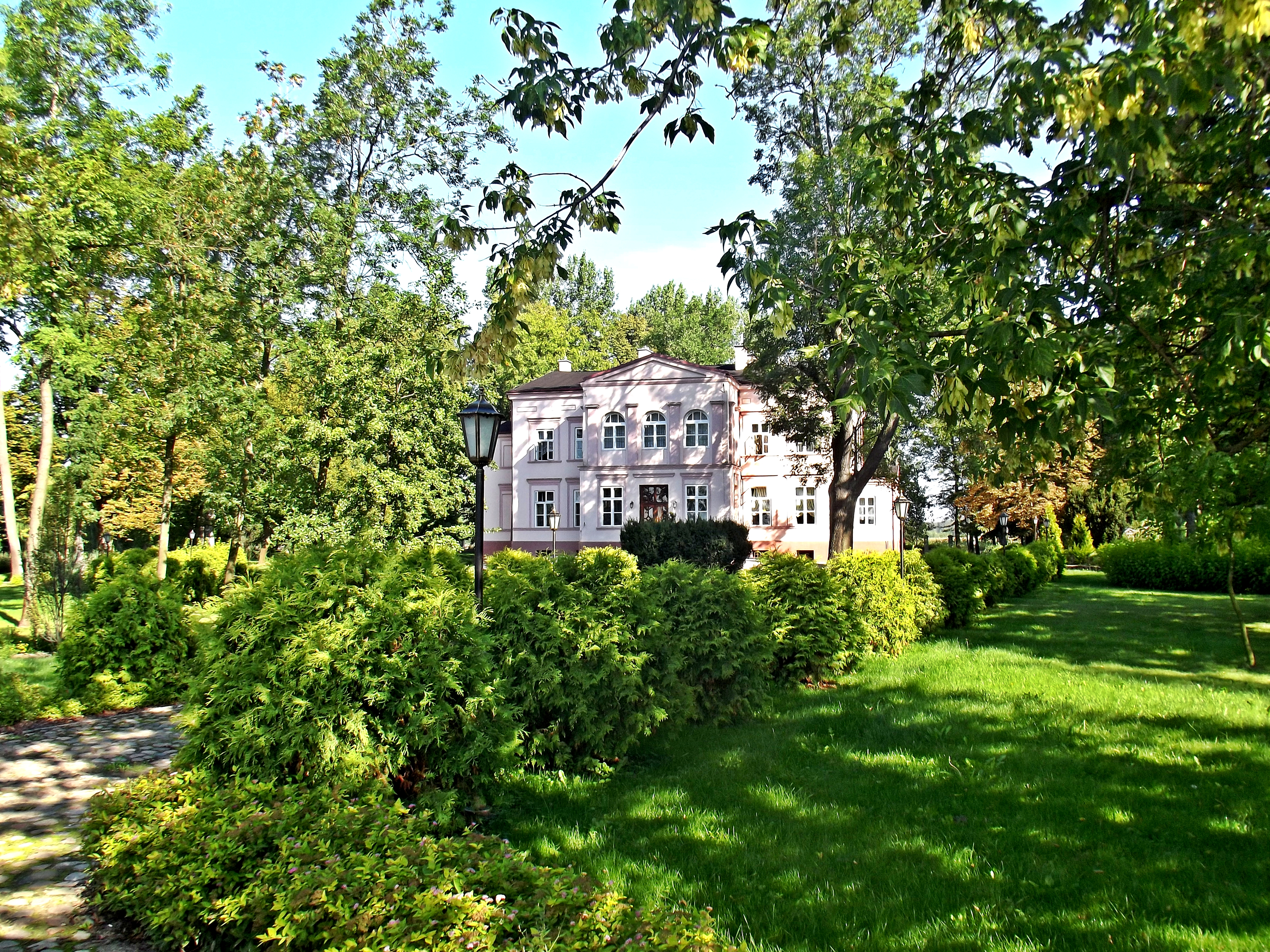 Domaników - zespół pałacowy z 2. połowy XIX w.: pałac, park (zabytek nr 298/40)